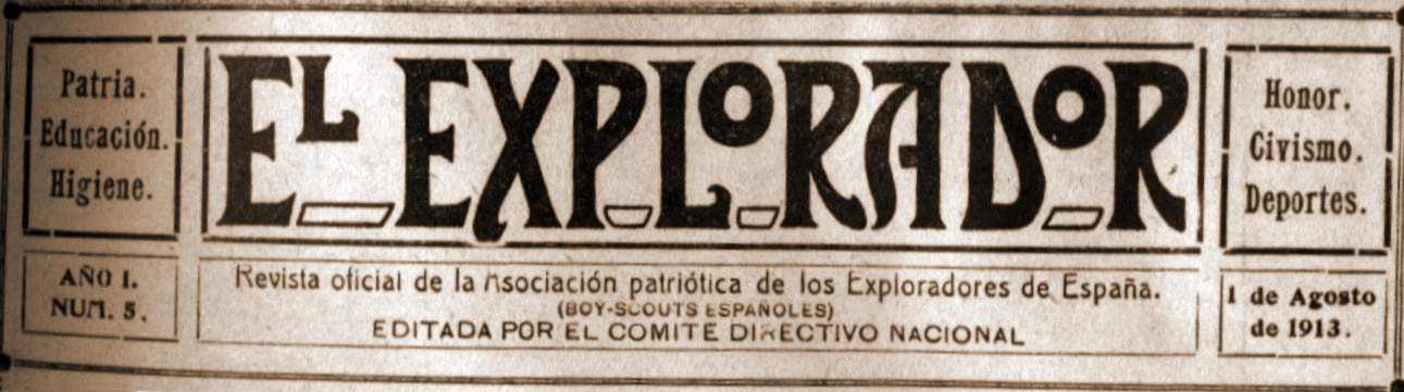 Detalle de la cabecera de la revista escultista El Explorador, del 1 de agosto de 1913